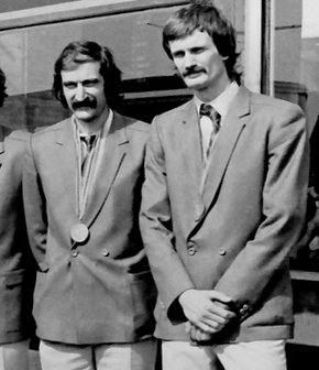 Dinamo - De la stanga la dreapta: Laurențiu Dumănoiu, Günther Enescu, sase voleibalisti de la Dinamo de valoare internationala